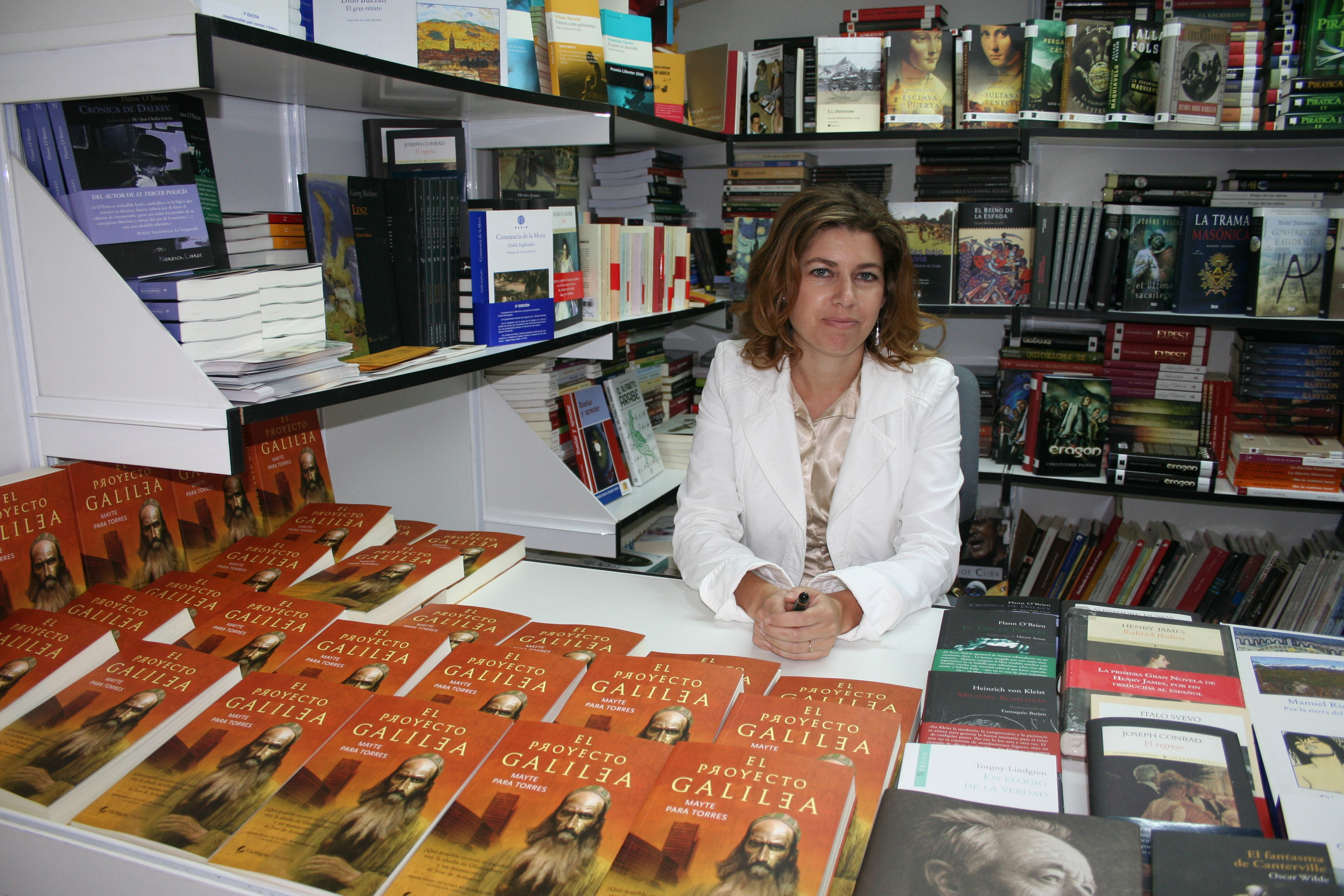 Firma de libros de Mayte Para Torres en la Feria del Libro de Madrid. Mayo de 2007